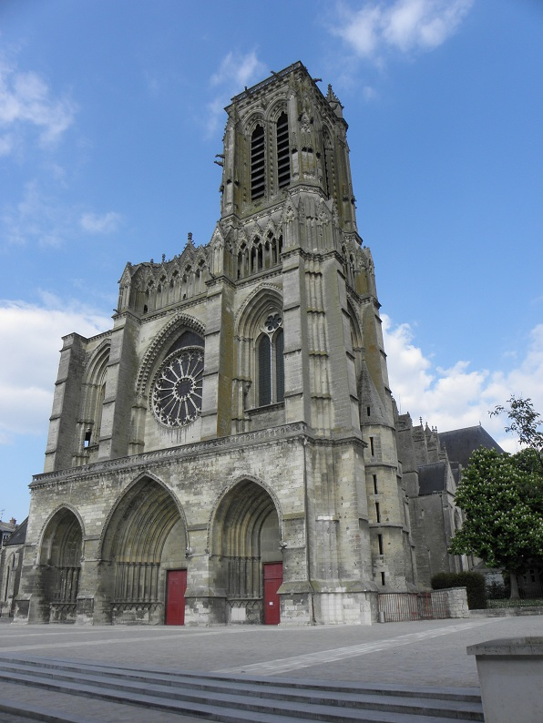 Façade occidentale de la cathédrale Saint-Gervais et Saint-Protais de Soissons (02).